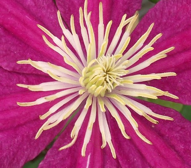 Etamines et stigmate de Barbara Harrington